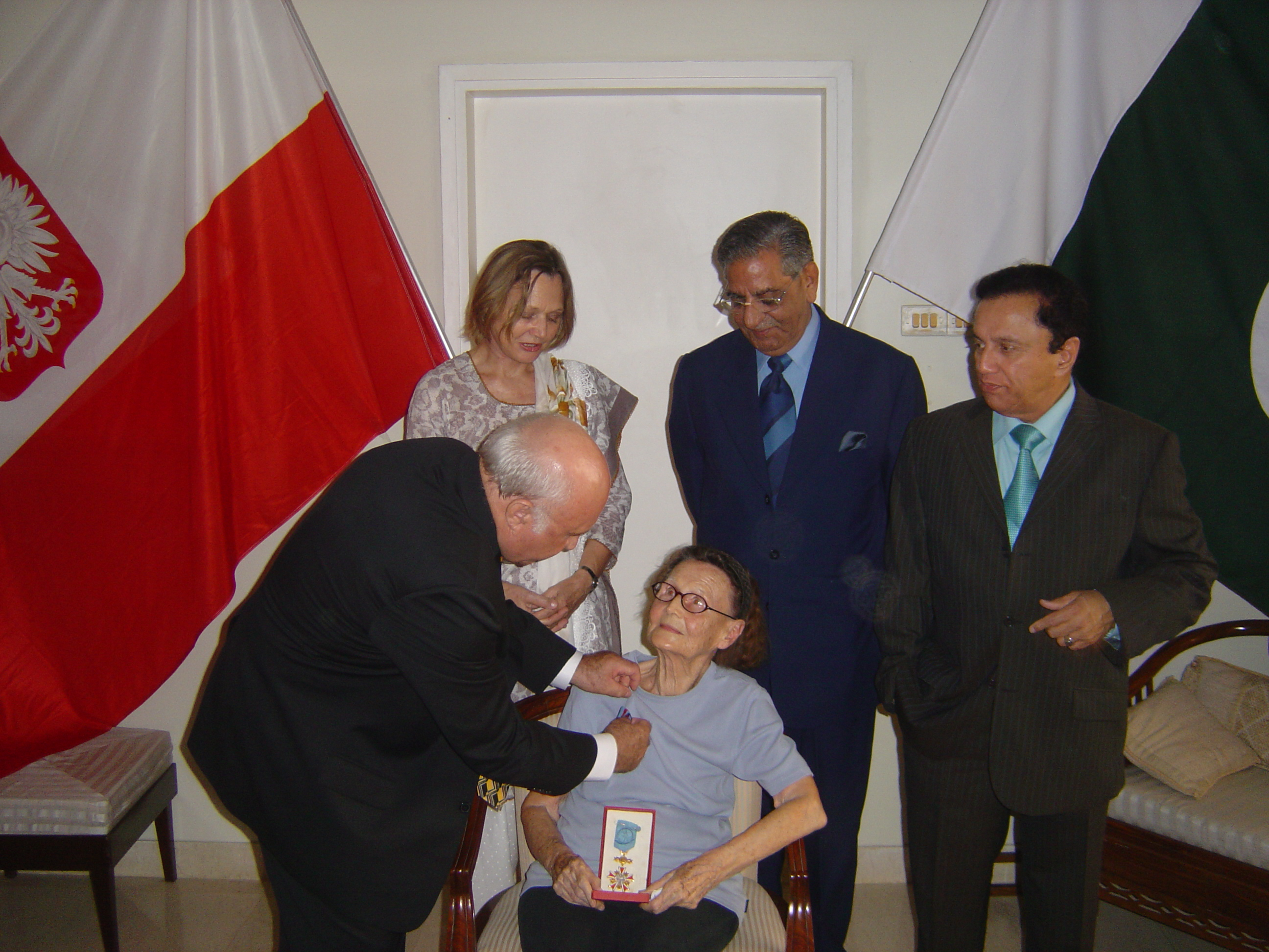 Zofia Turowicz - odznaczenie Pro Memoria.